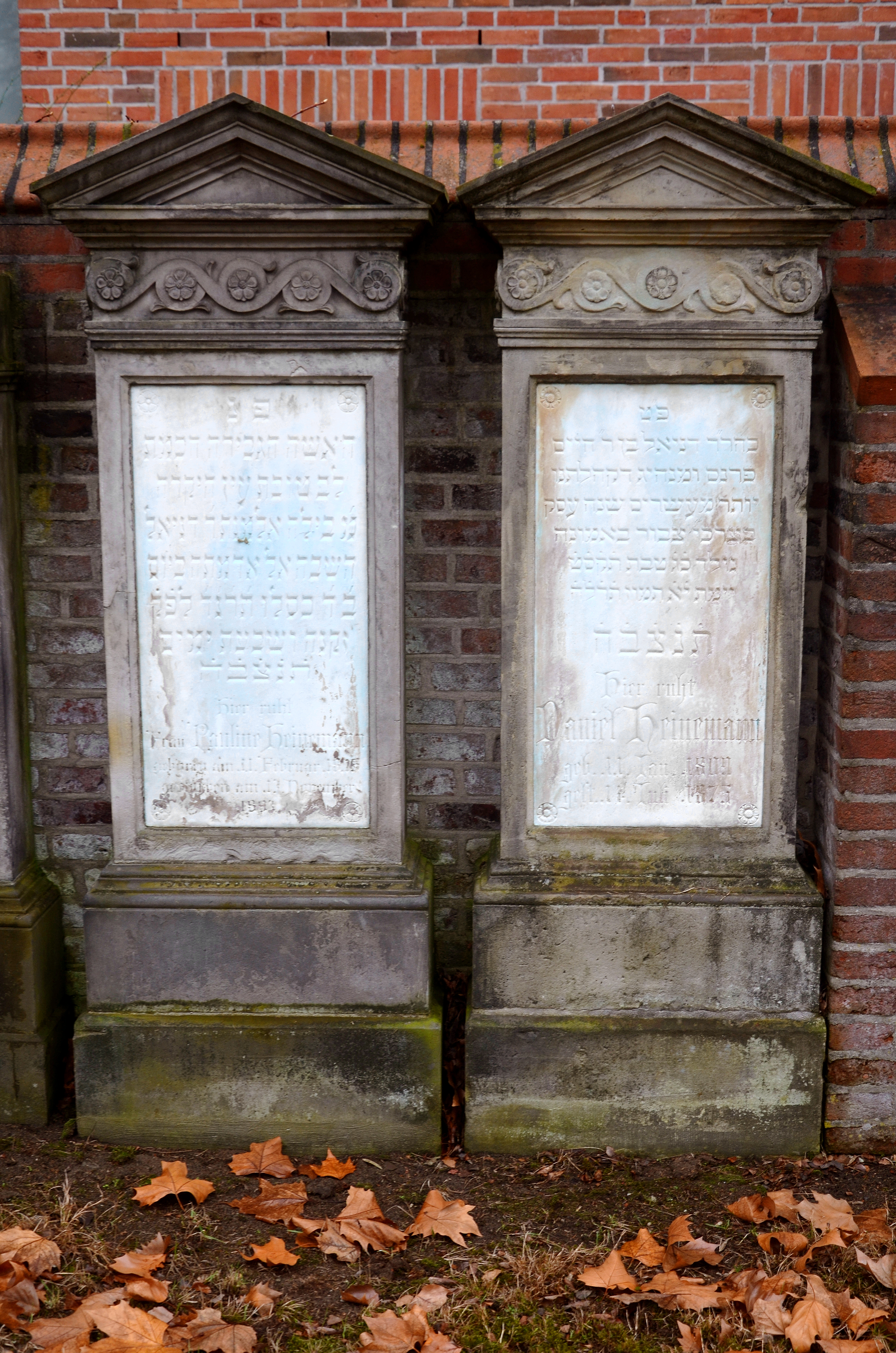 Grabmal mit den Lebens- und Sterbens-Daten des Kaufmanns Daniel Heinemann (geboren 11. Januar 1809; gestorben 11. Juli 1875) und seiner Ehefrau Pauline (geboren 11. Februar 1815; gestorben 13. November 1893) auf dem Jüdischer Friedhof An der Strangriede in Hannover ...